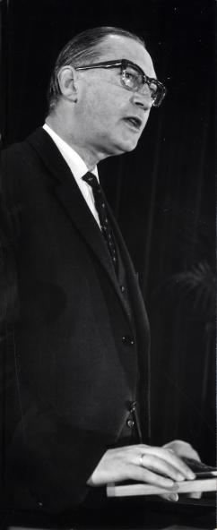 Berghuis, W.P. (ARP). Voorzitter Berghuis opent een partijvergadering, in verband met de komende verkiezingen, van de ARP. Nederland, Utrecht, 13 februari 1966.